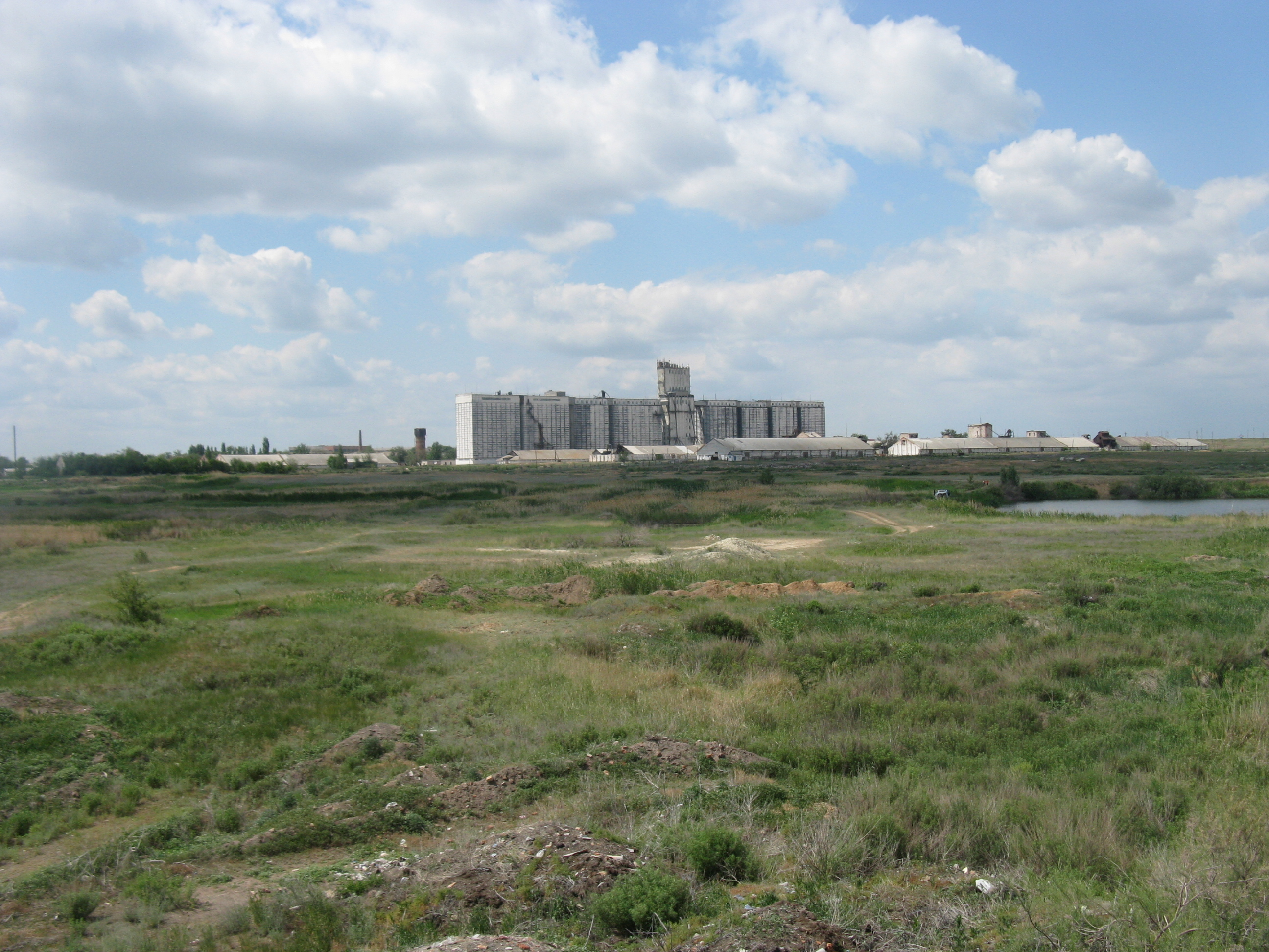 Элеватор